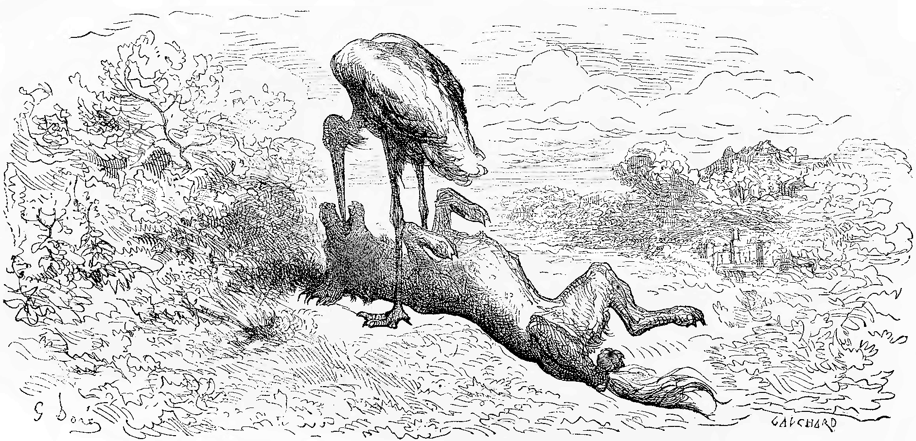 grafika z książki PL Bajki, Jean de La Fontaine, nakładem i drukiem Jana Noskowskiego, Warszawa 1876